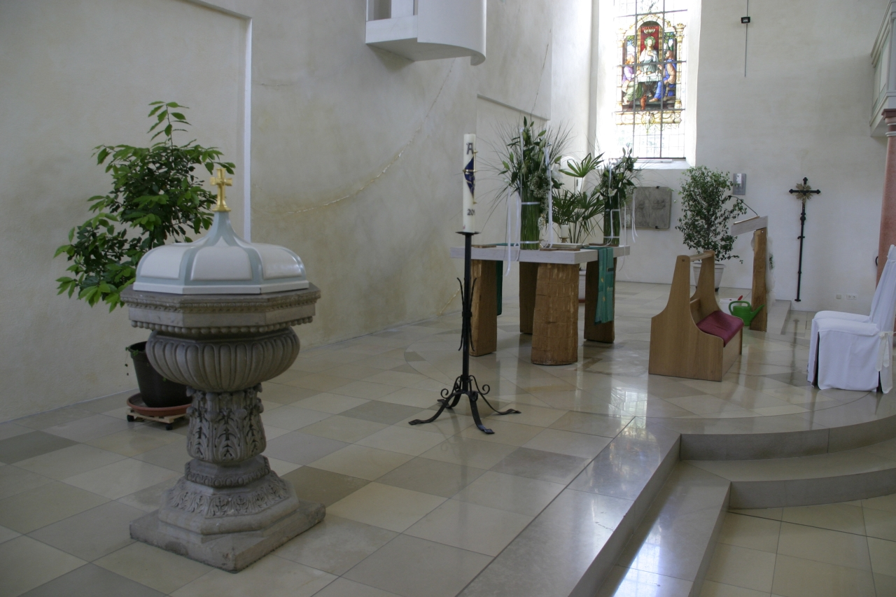 Johanneskirche Lichtenberg2